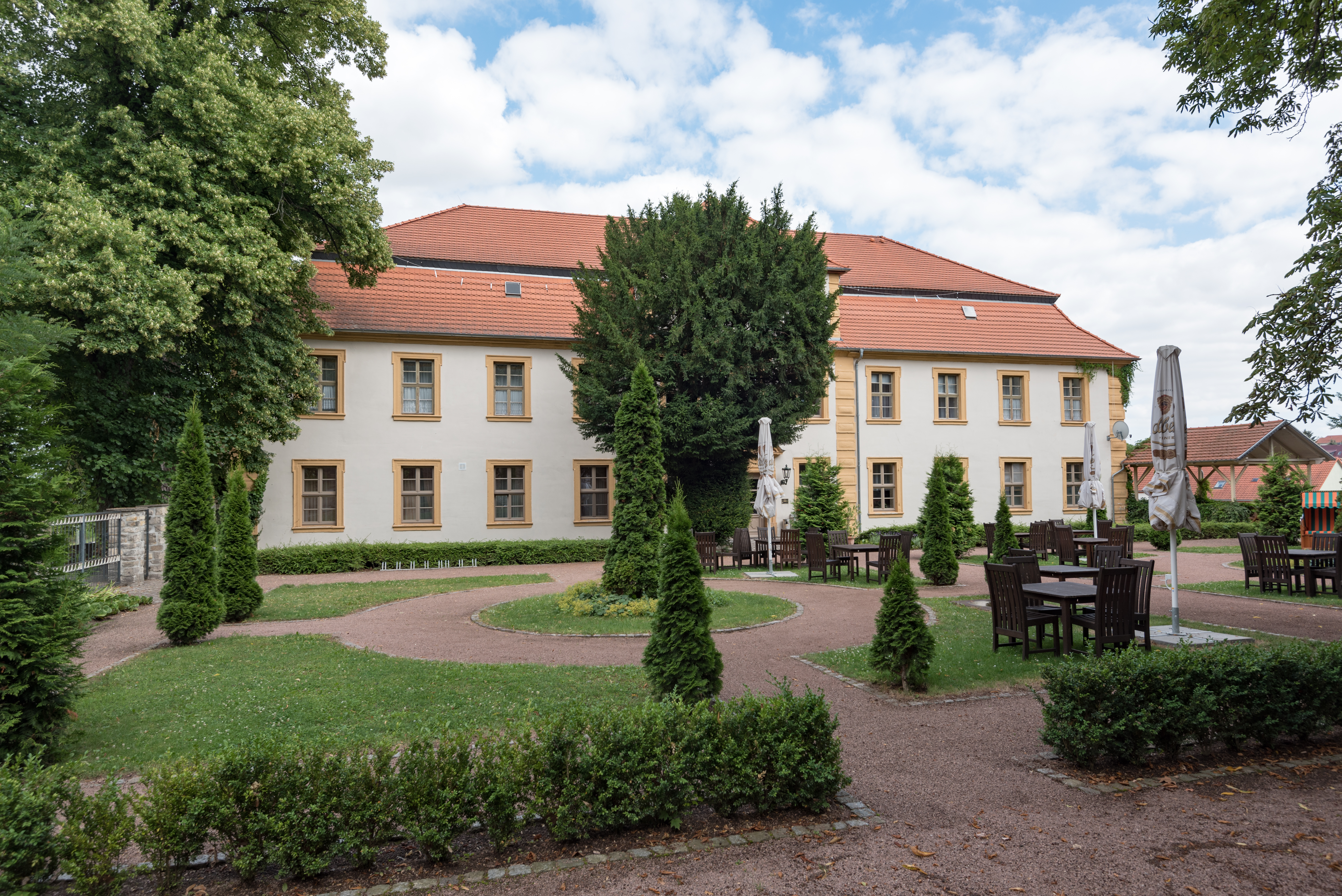 Hecklingen, Hugo-Gast-Siedlung, Schloss